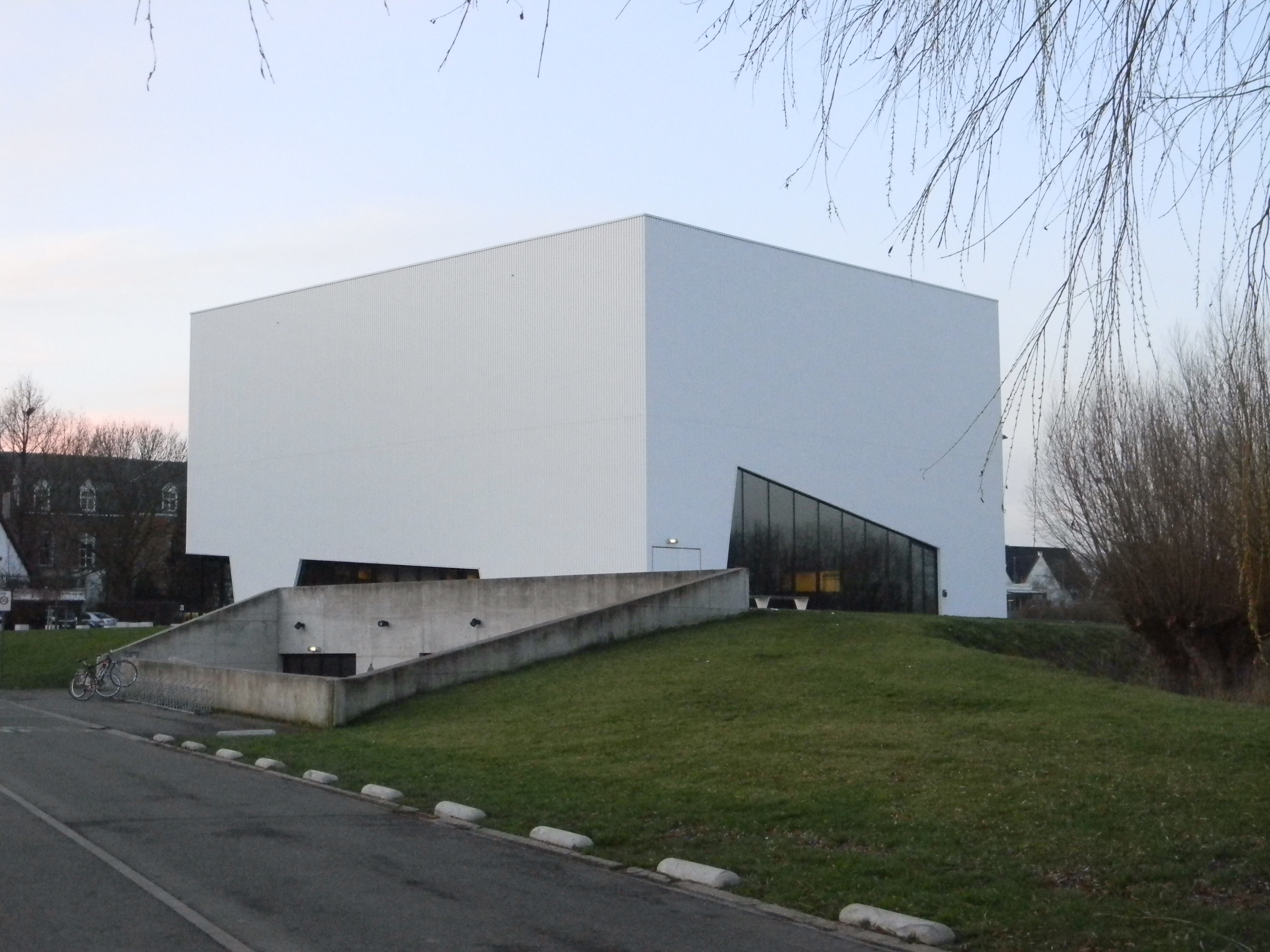 Gemeenschapscentrum Spikkerelle, gezien vanuit de Scheldelaan te Avelgem met onderaan Jeugdhuis Krak.